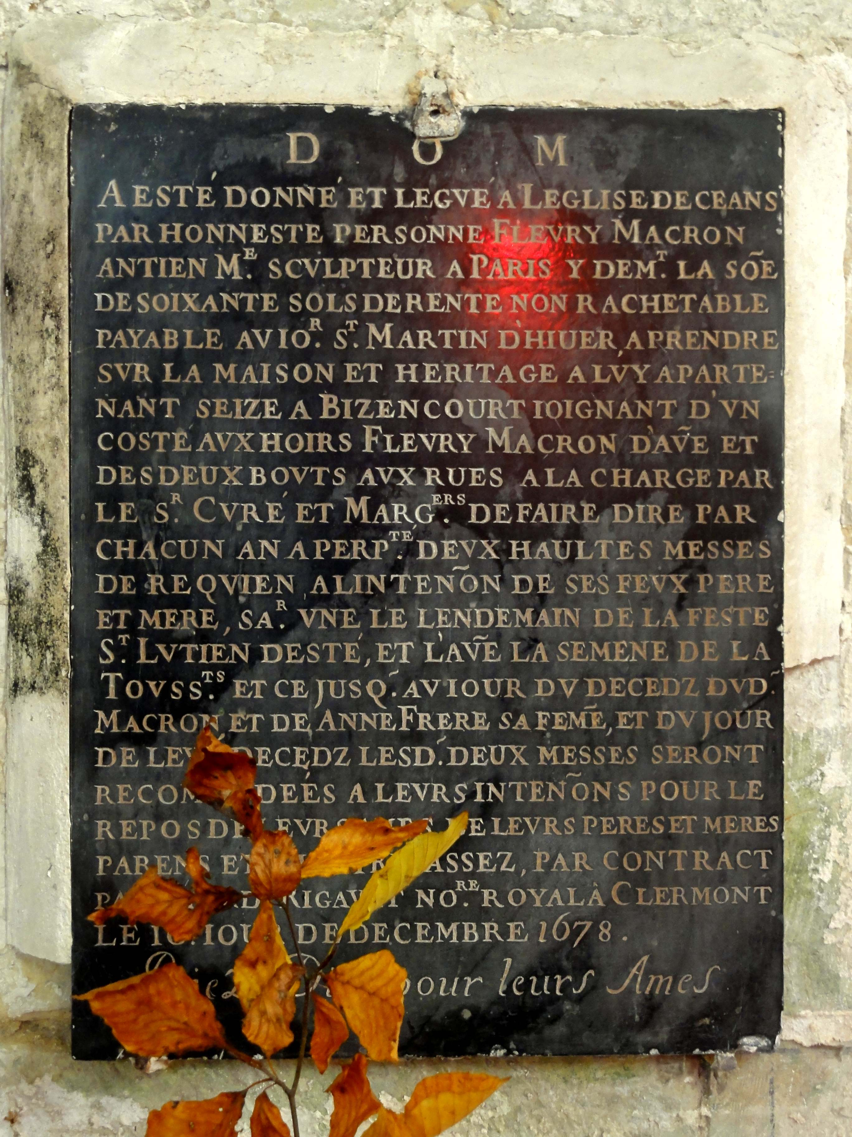 Plaque de fondation de Fleury Macron, mort en 1678.